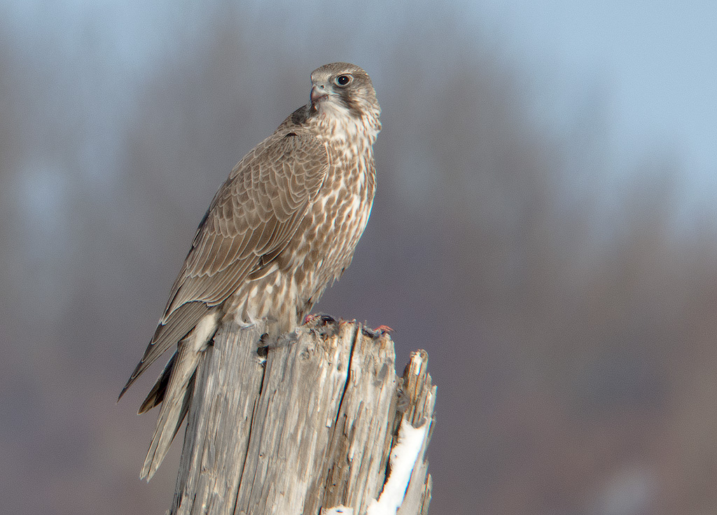 シロハヤブサ（中間型）